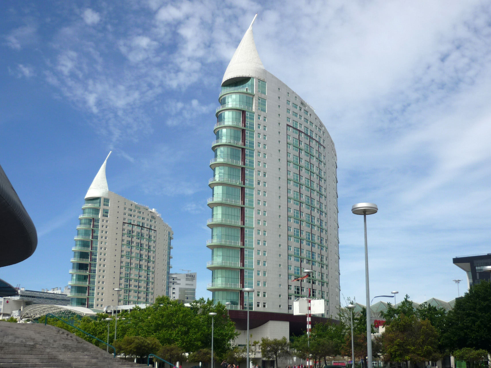 Moderne Architektur am Bahnhof Oriente am Parque das Nações (Nationen-Park) / Gelände der Expo-98 in Lissabon